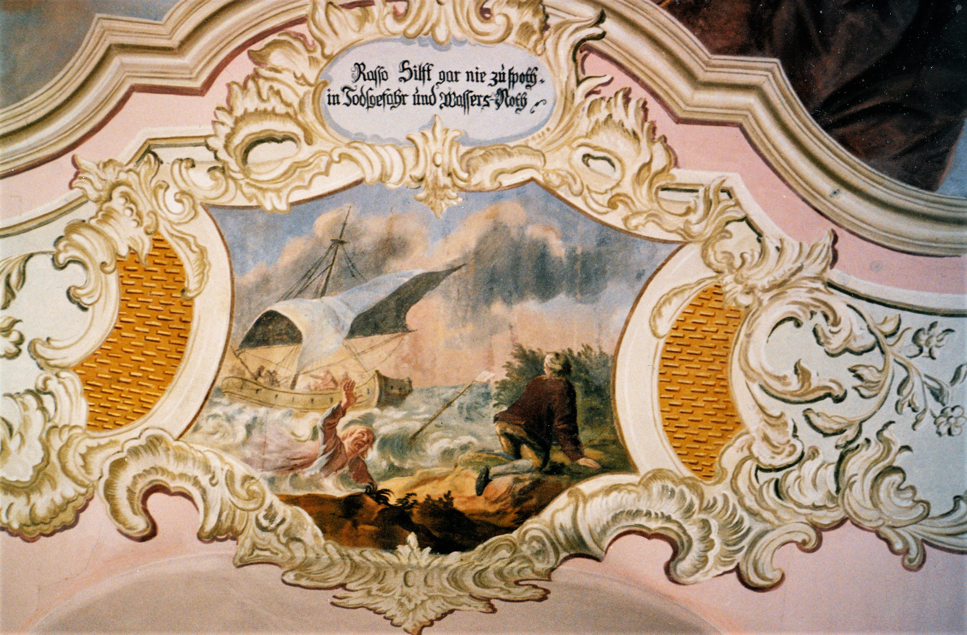 Fresko in St. Rasso (Untergammenried) - Der heilige Rasso hilft bei Gefahren der 4 Elemente – Wasser: Er rettet vor dem Ertrinken (1747)